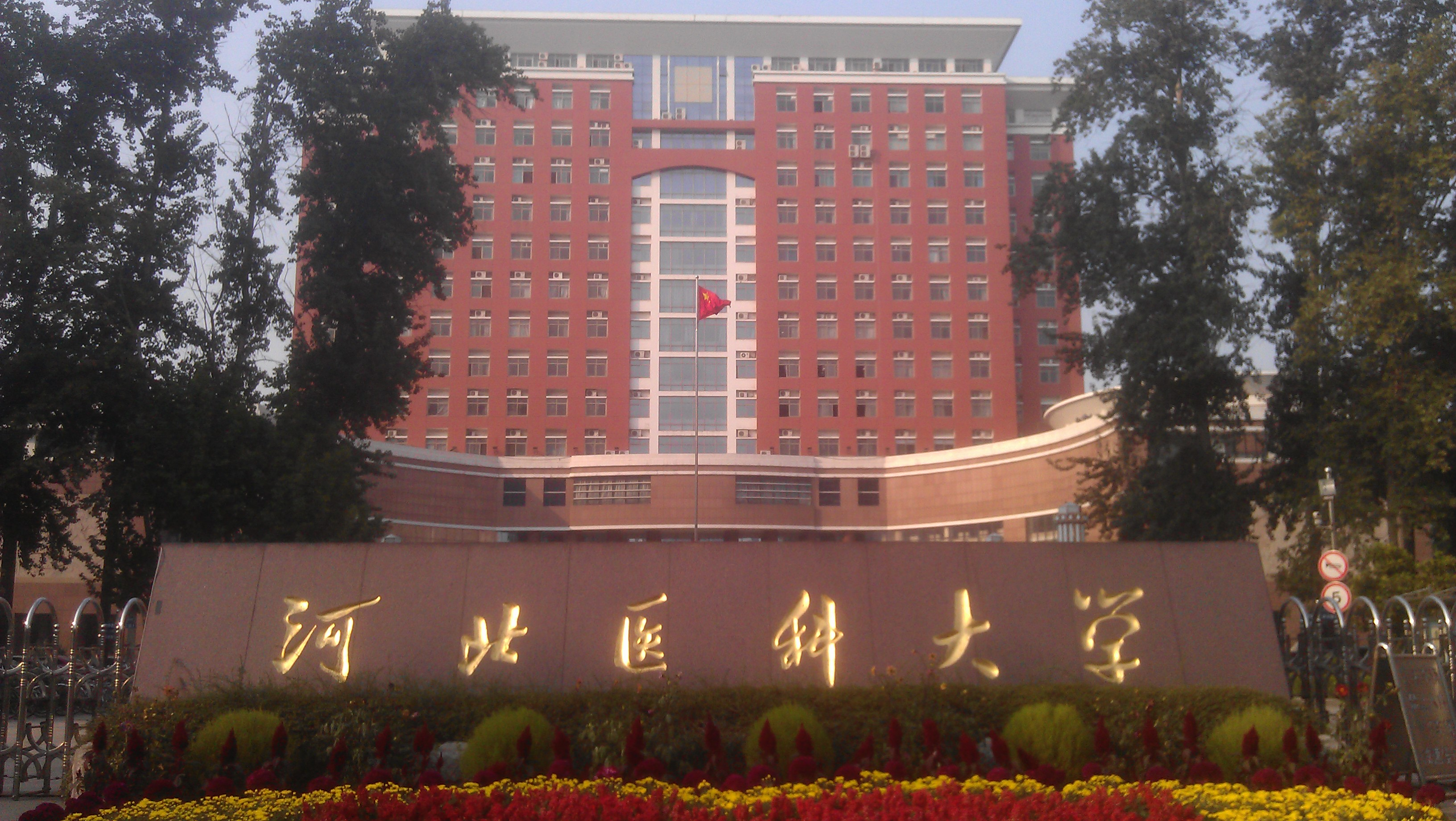 中文（中国大陆）: 2012年10月1日国庆节期间拍摄于河北医科大学本校区正门门口